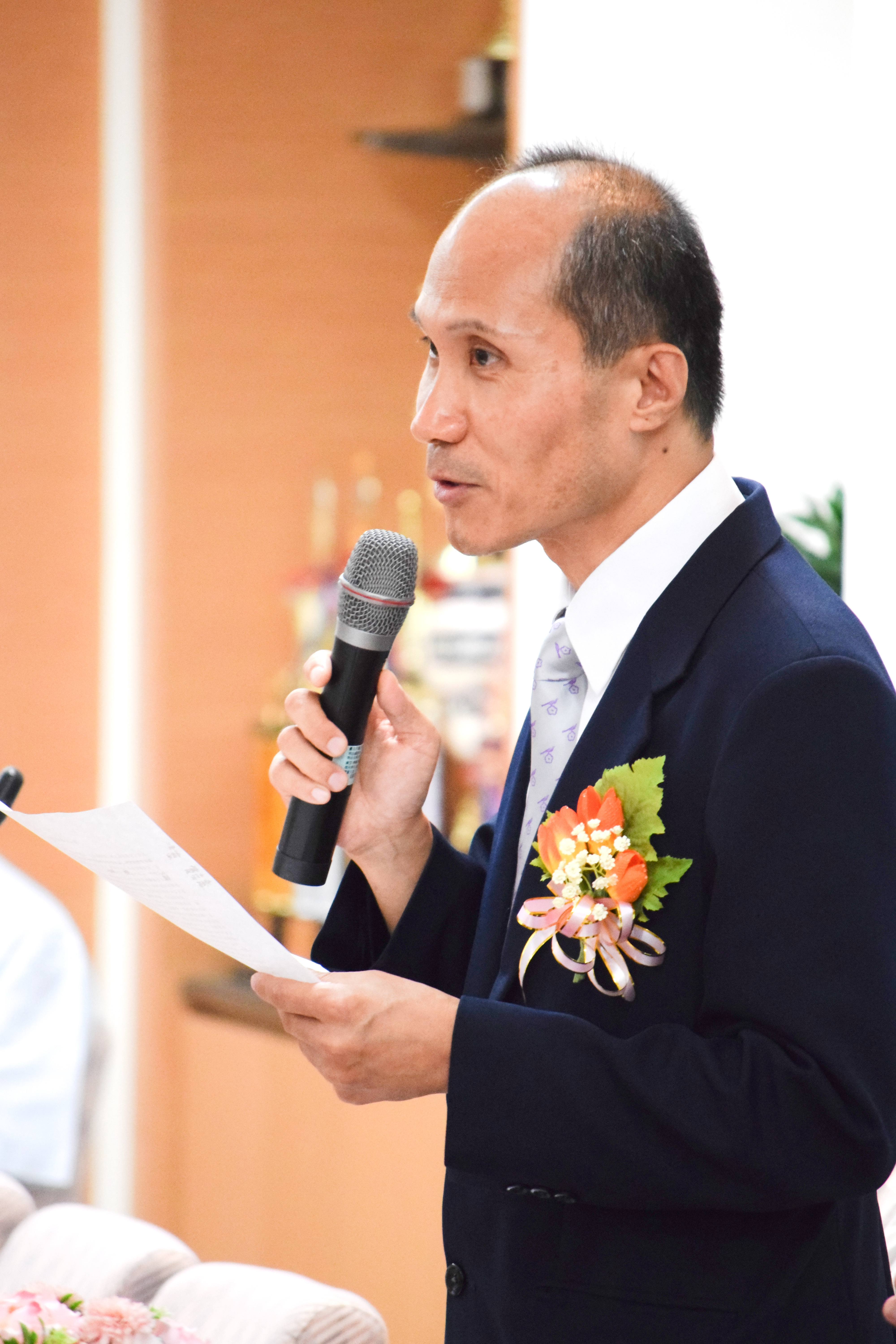 中文（台灣）: 麗山第三任校長徐建國，攝於麗山高中